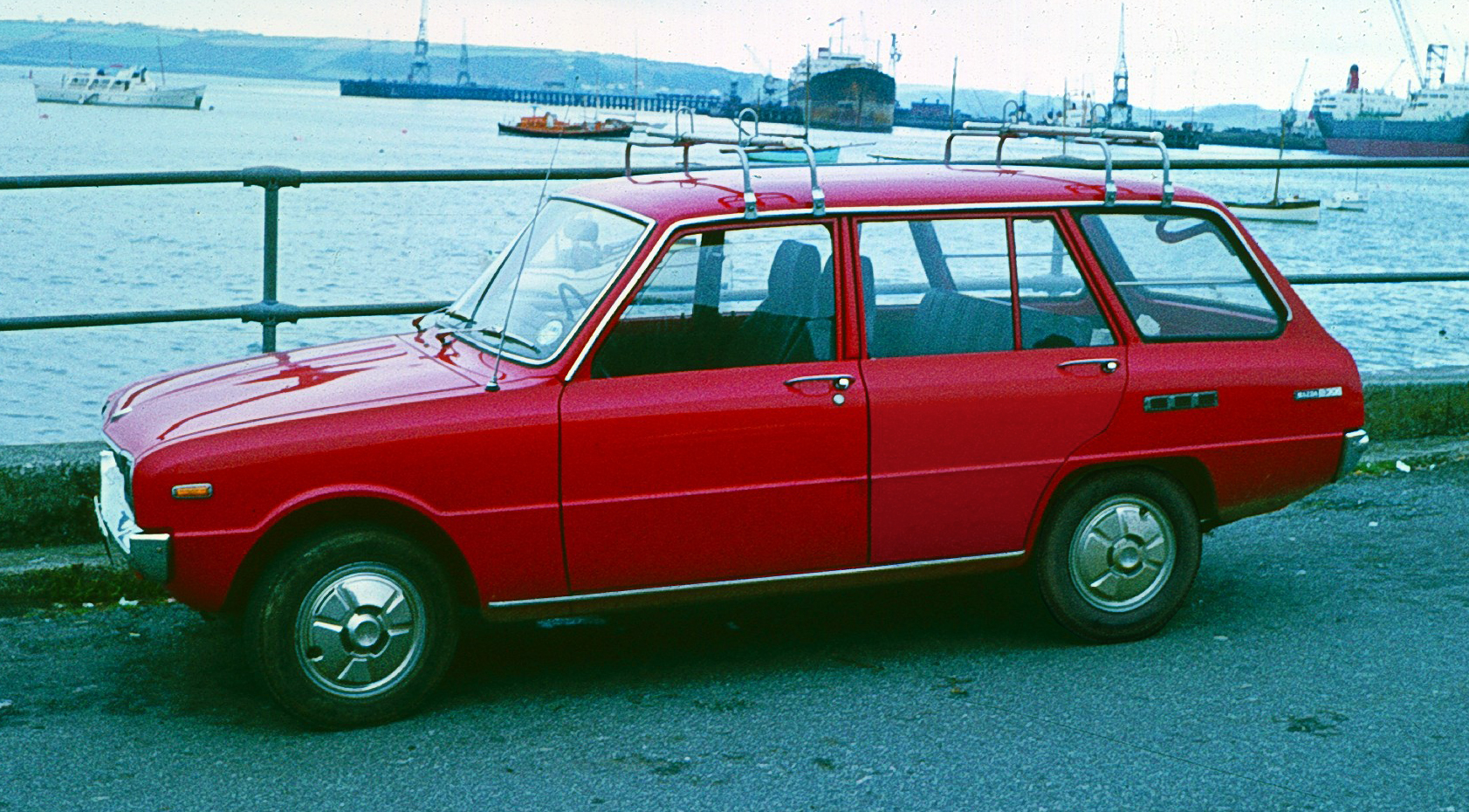 Mazda 1300 estate on Belgian dockside